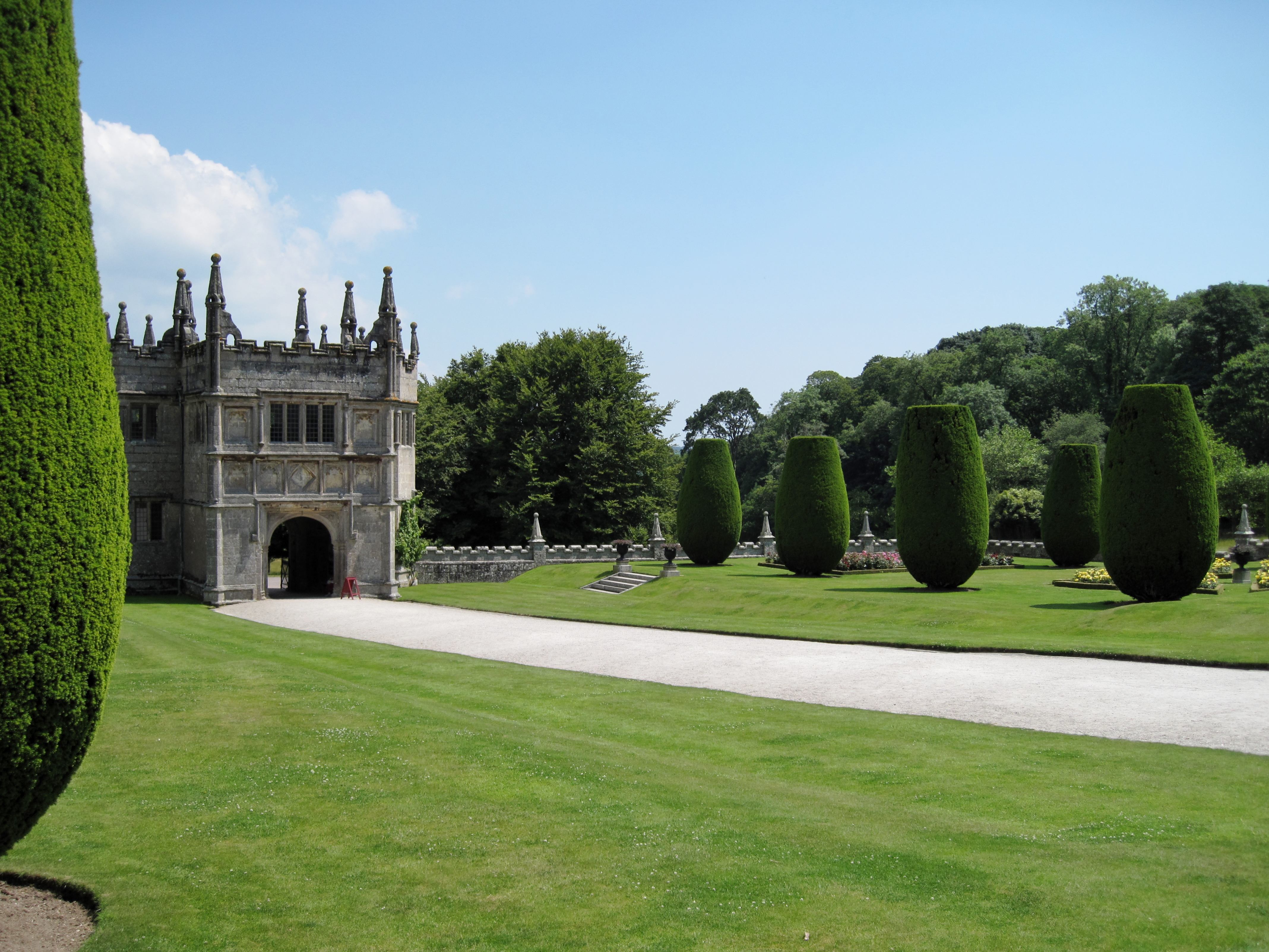 Garten und Torhaus von Lanhydrock, einem Herrenhaus nahe Bodmin in Cornwall, England